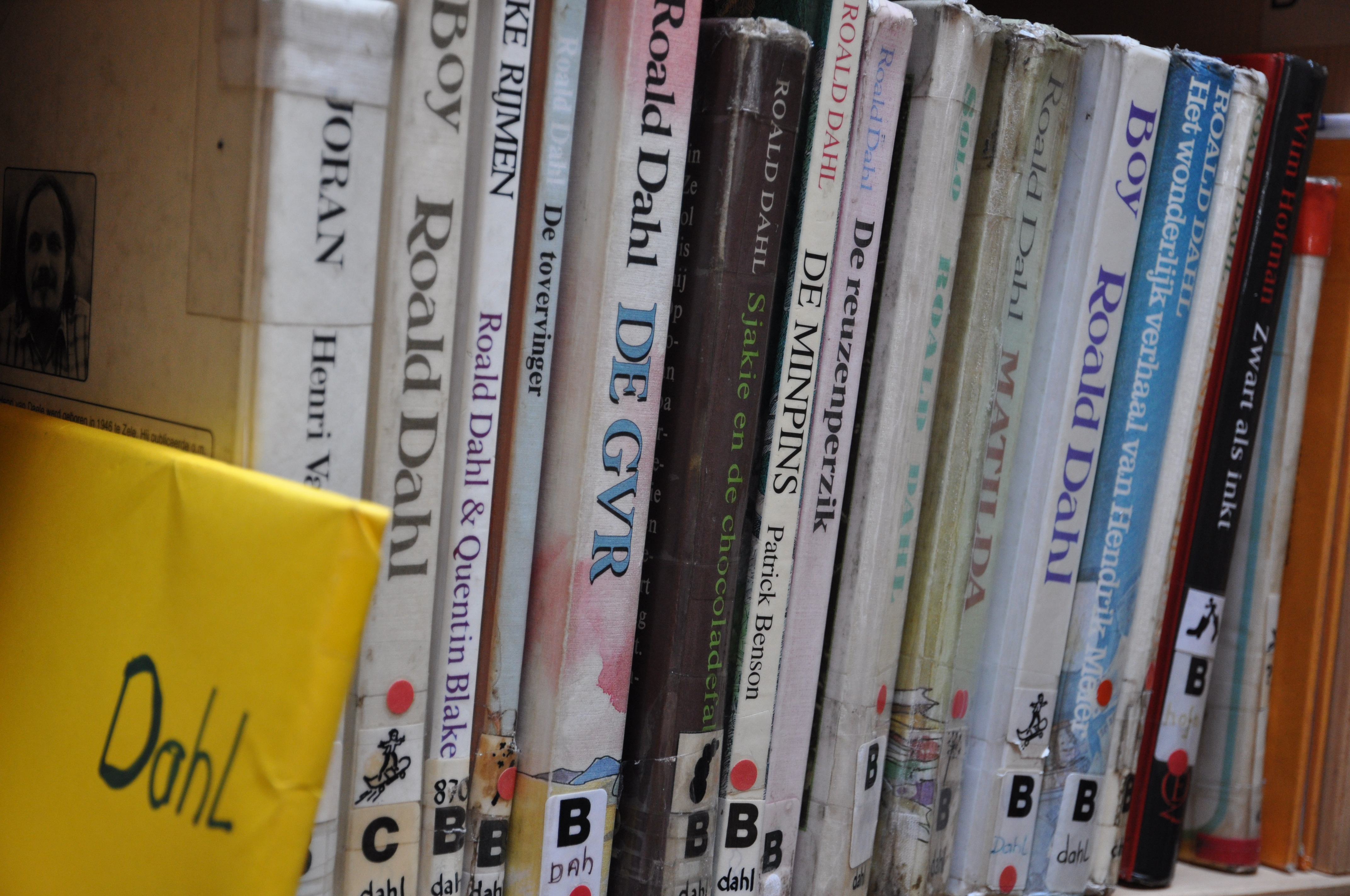 Boeken van Roald Dahl in de bibliotheek van de Werkplaats Kindergemeenschap in Bilthoven.